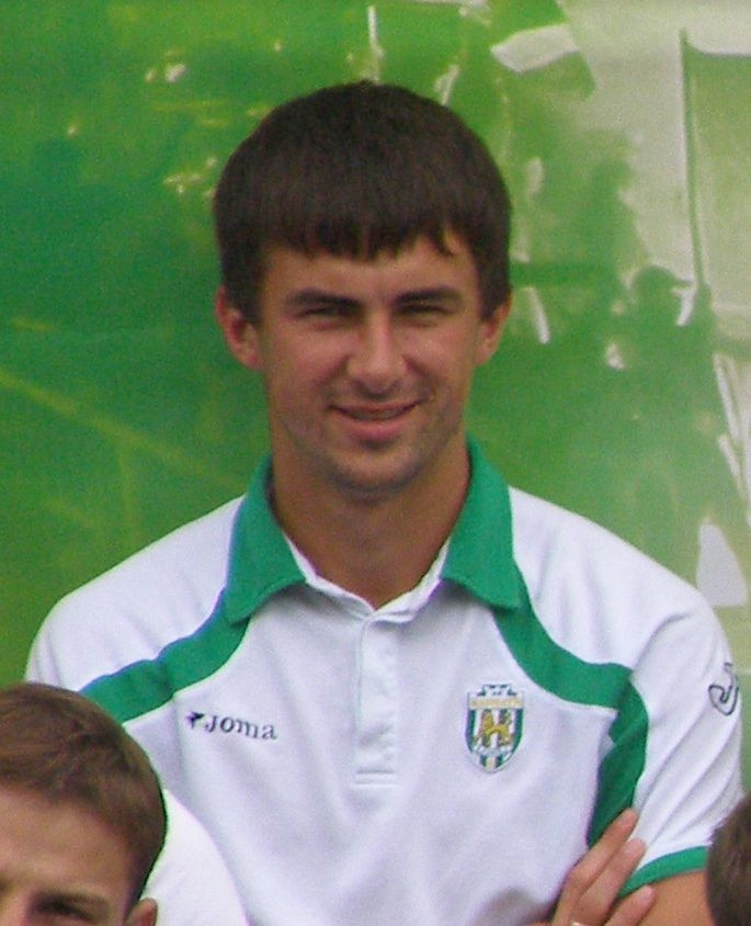 Український футболіст Андрій Гурський під час представлення команди "Карпати" (Львів) перед сезоном 2010/11